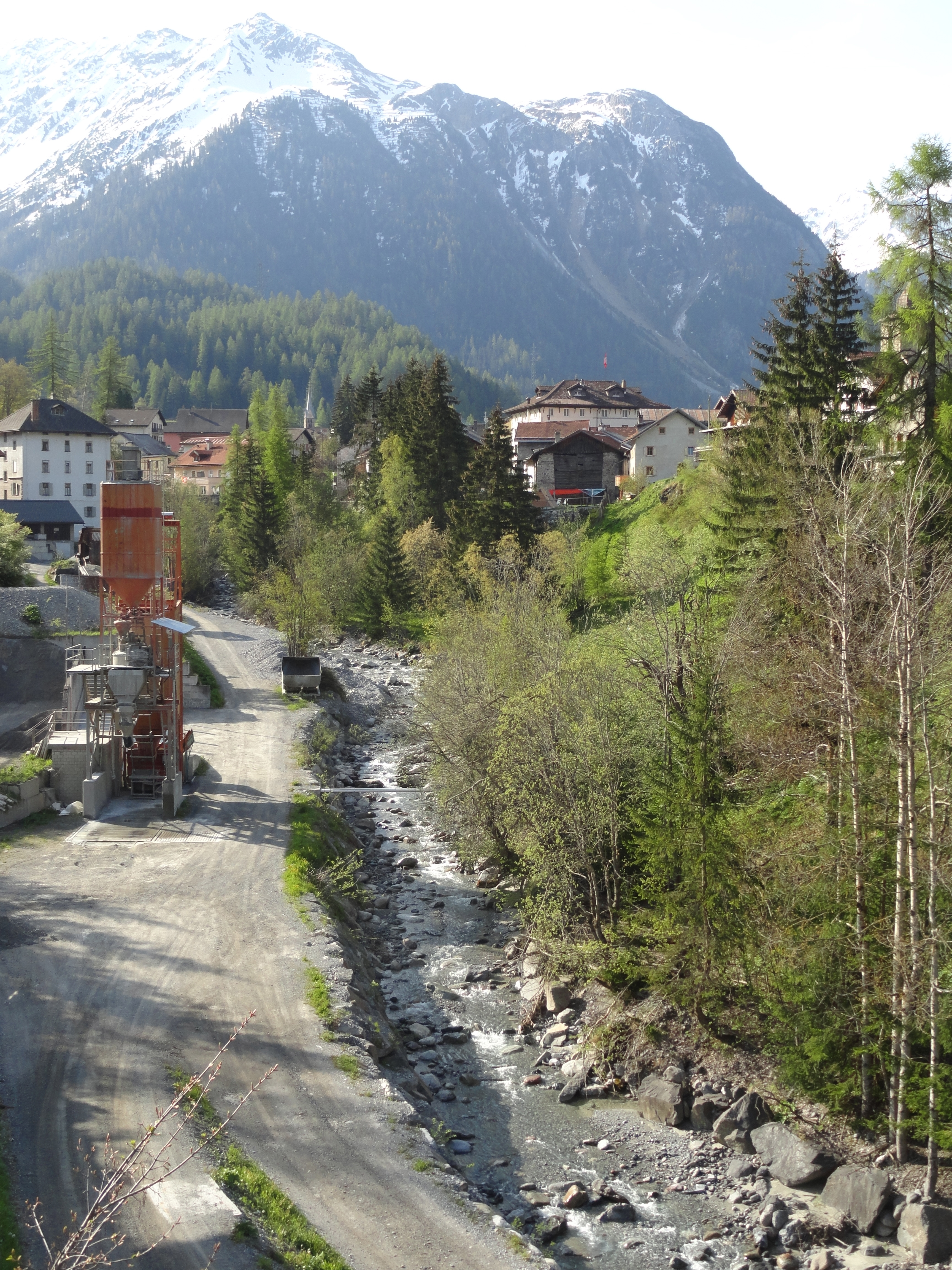 Tuorsbach